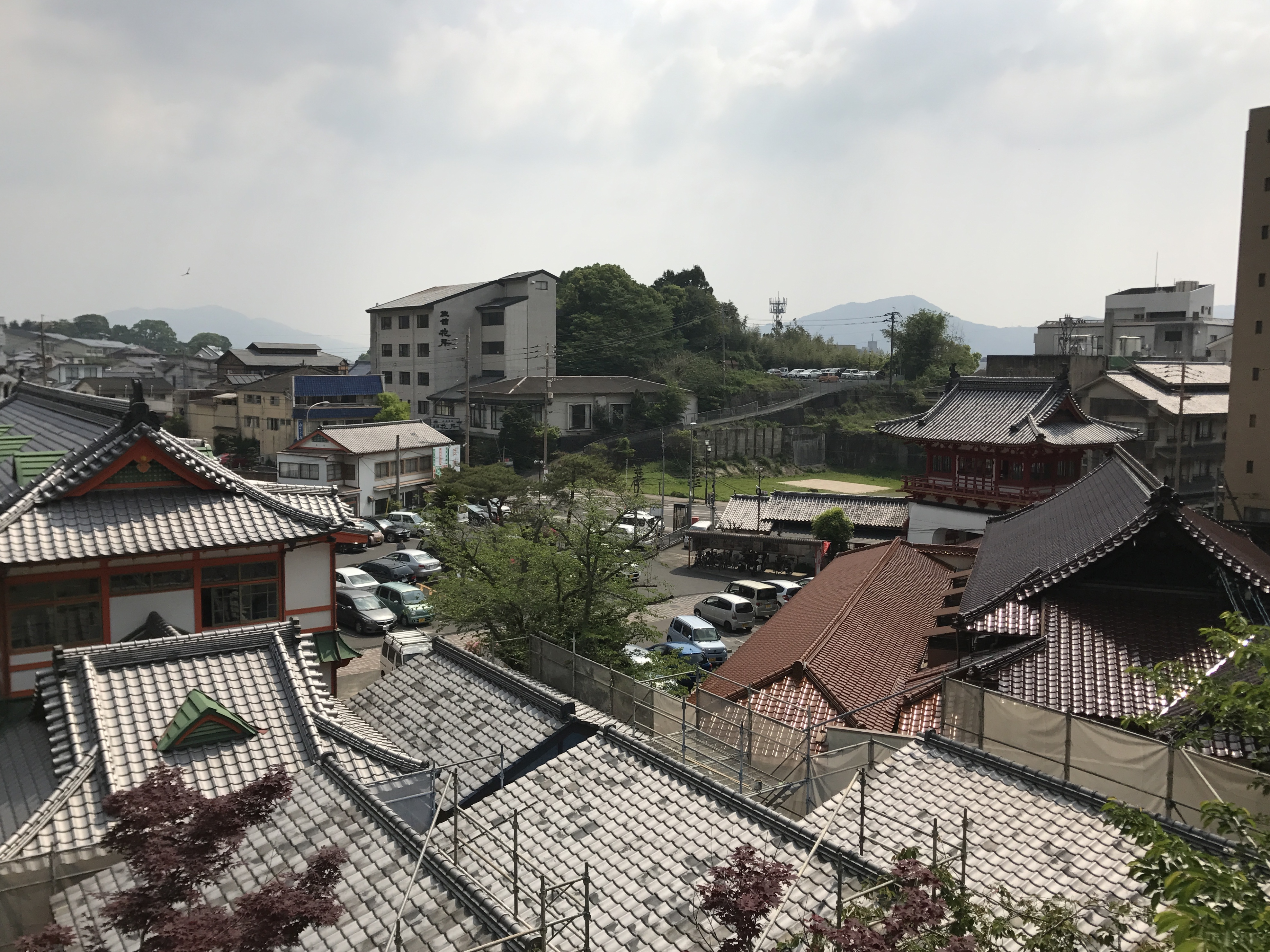 桜山公園より見下ろす武雄温泉楼門付近の温泉街